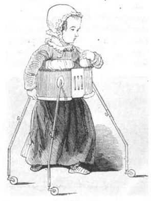 Laufwagen.